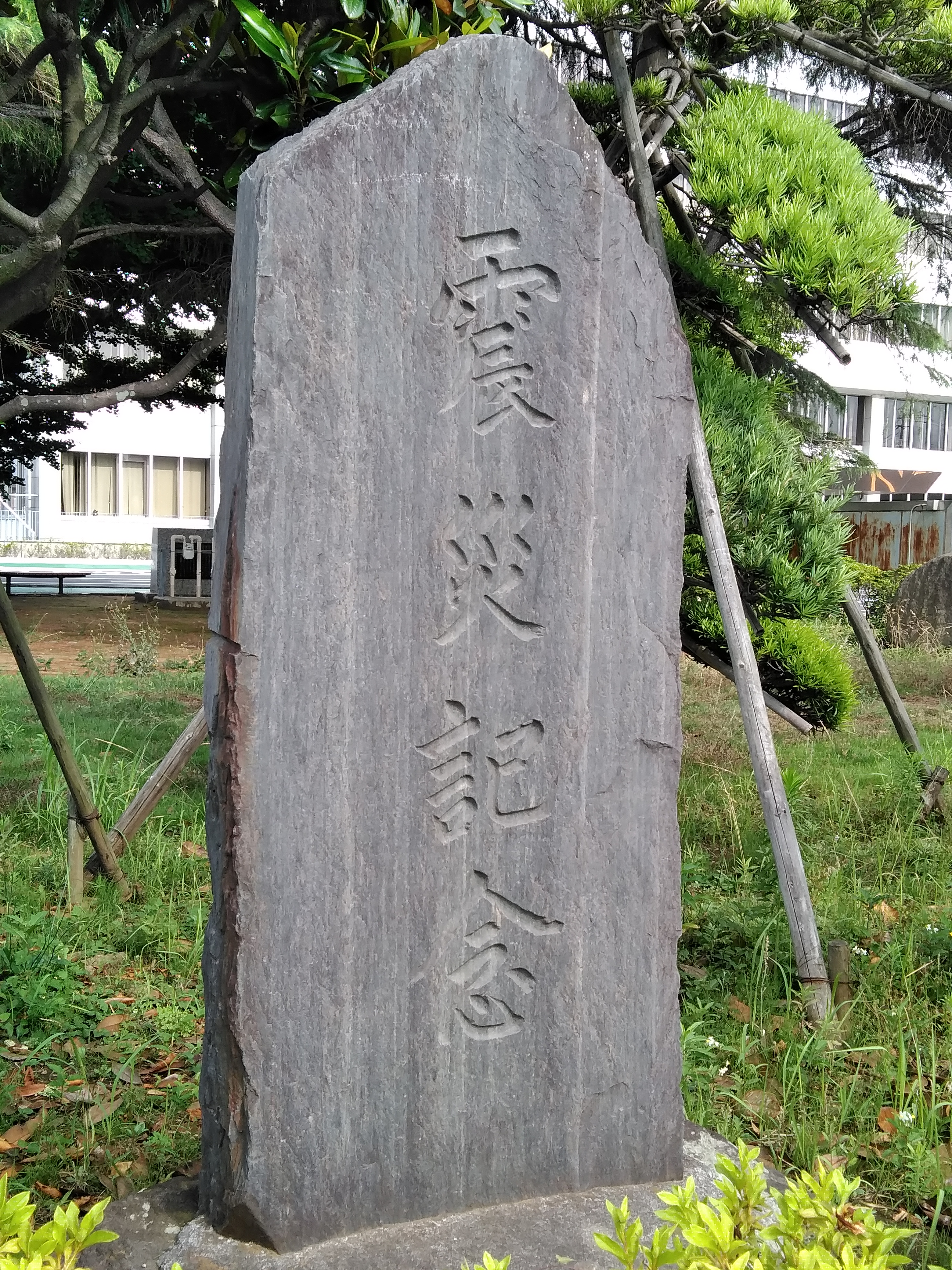 千葉県鎌ケ谷市役所の一角に建つ関東大震災を顕彰した「震災記念」碑。2019年に新たに制定された地図記号の自然災害伝承碑の対象に選定された。